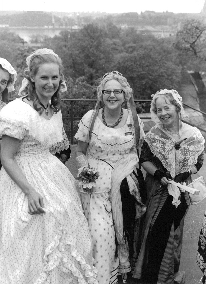 Fruarna Birgit Sommer, Gunnel Hazelius-Berg och Margit Siwertz bar tidstypiska kläder.Romantiken blommade på måndagskvällen på Solliden. Sällskapet Nya Idun höll vårfest i form av en musikalisk salong 1840 med Malla Montgomery-Silfverstolpe som värdinna. Gun Ankarcrona spelade Mallas roll. omgiven av skönt 1840-talsklädda gäster, bl.a. sällskapets sekreterare fil.dr. Birgitta Lager och sångerskan Iwa Voghera. Birgit Falkman-Sommer (piano), Karin Langebo (harpa) och Margot Rödin (sång) underhöll och Margareta Kjellberg läste romantiska dikter. Före middagen bjöd sällskapets ordförande Gunnel Hazelius-Berg de cirka nittio deltagarna på ett glas sherry i sitt hem i Sagaliden på Skansen. Många i dräkter, andra helt vanligt vårfinklädda.